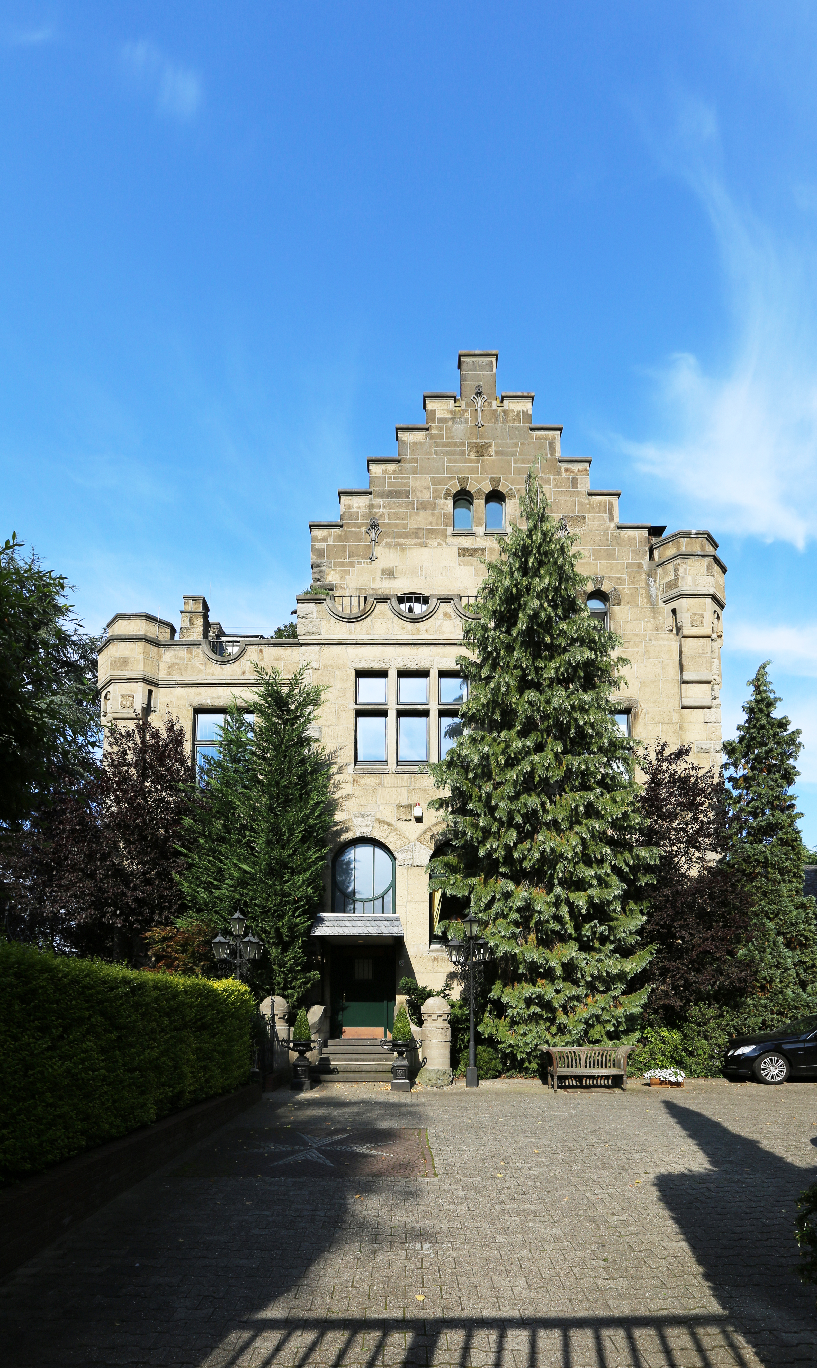 Villa Malta (Malteserkreuz als Wappen im Zugangsweg), Rodenkirchen (Köln), Hauptstraße 11